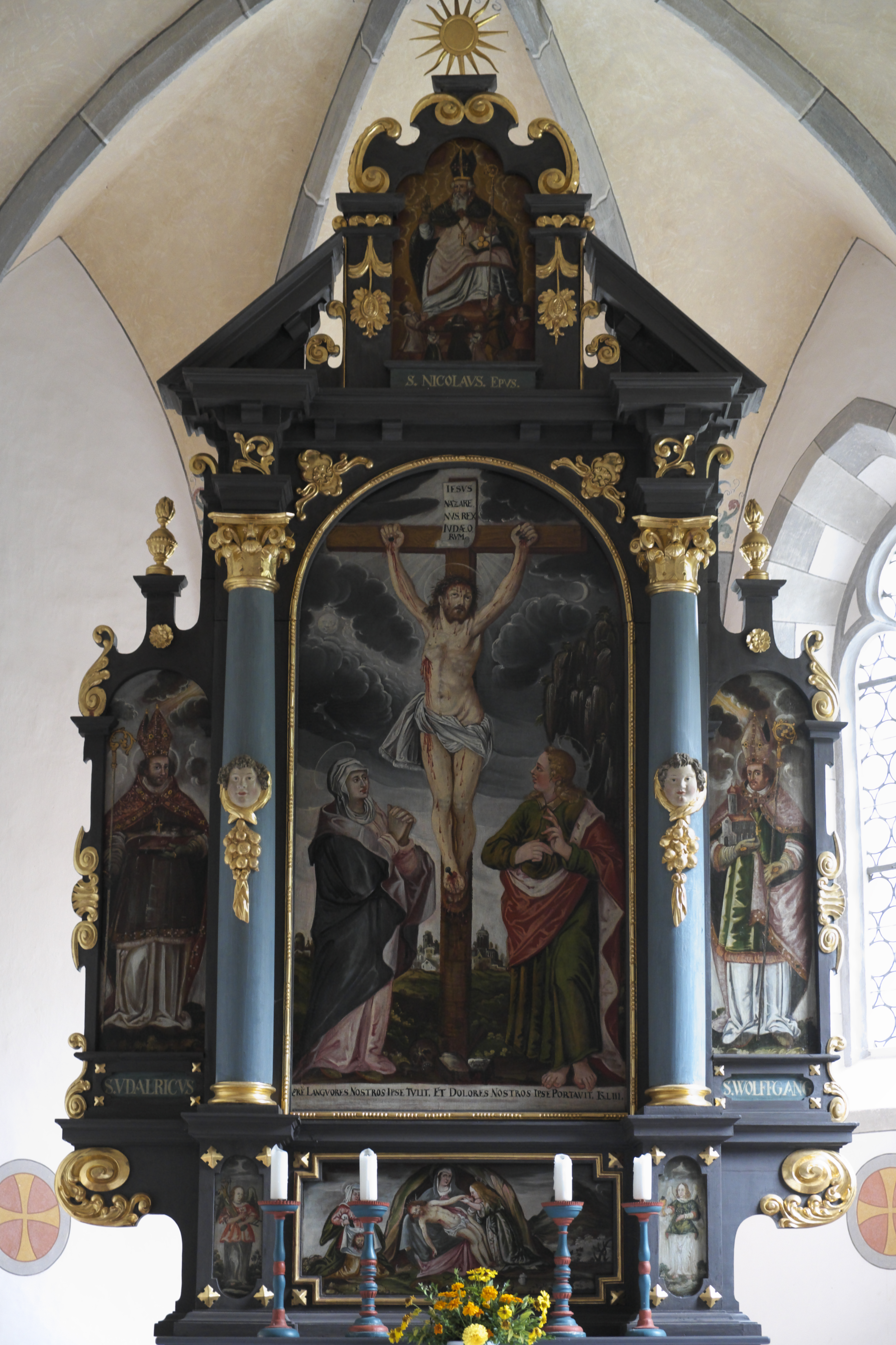 Katholische Filialkirche St. Nikolaus in Oberkirch (Füssen) im Landkreis Ostallgäu (Bayern/Deutschland), Hochaltar von 1655 (Weihinschrift auf der Rückseite); links: heiliger Ulrich, rechts: heiliger Wolfgang von Regensburg, Mitte: Christus am Kreuz mit Maria und Johannes; in der Predella: Veronika mit Schweißtuch, Pietà mit Maria Magdalena